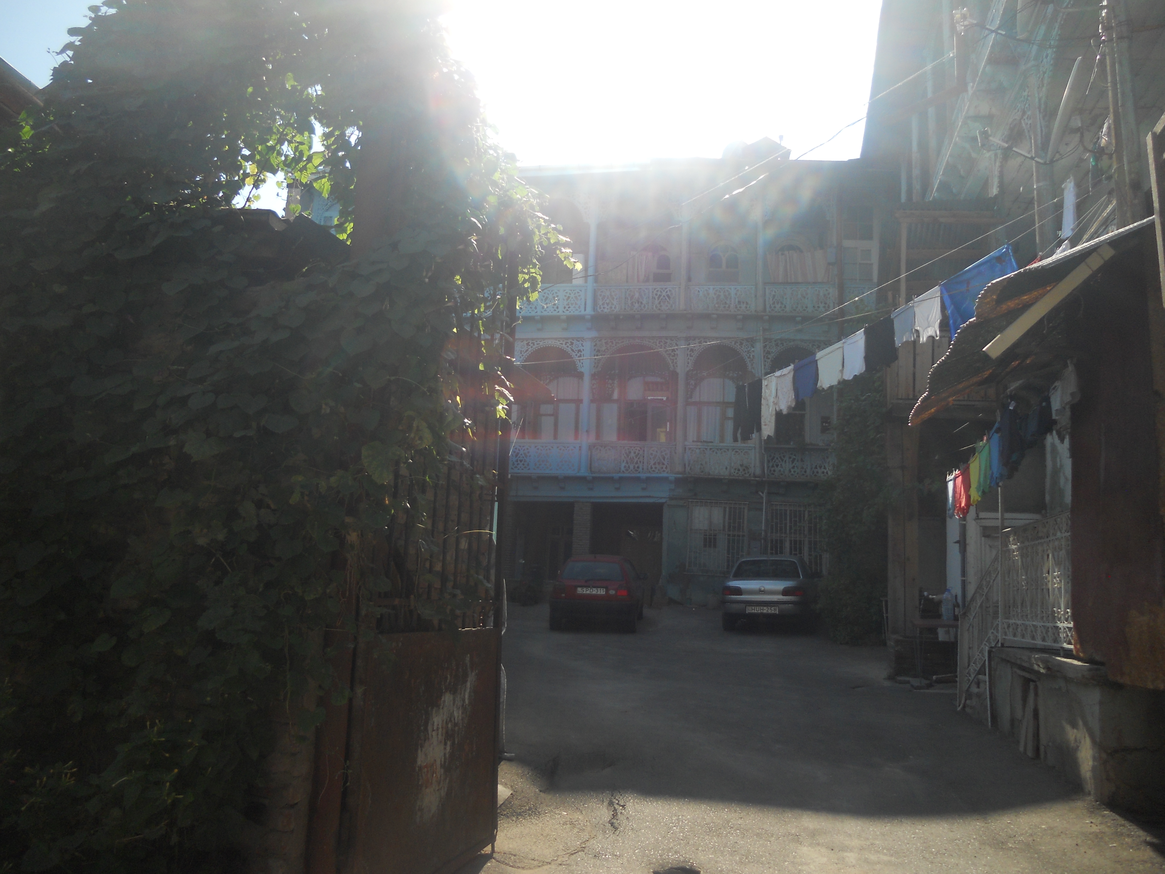 საცხოვრებელი სახლი